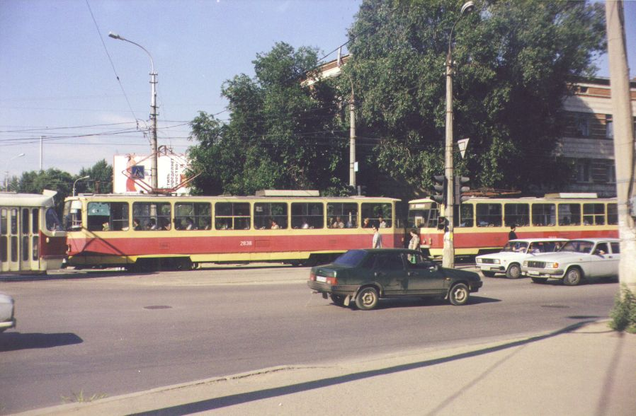 Tramoj en Volgograd, Rusio, 2003. Videblas supertraka kontakta linio kaj pantografo sur tegmento de vagono (maldekstre). Mi, auxtoro de la bildo, permesas al cxiuj uzi gxin kun cxi tiuj kondicxoj: La fonta bildo de cxi tiu bildo estas ankaux en mia propra retpagxaro [1]